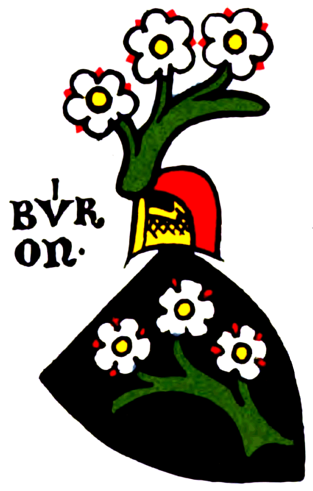 Wappen der Berckheim (hier Berchain)